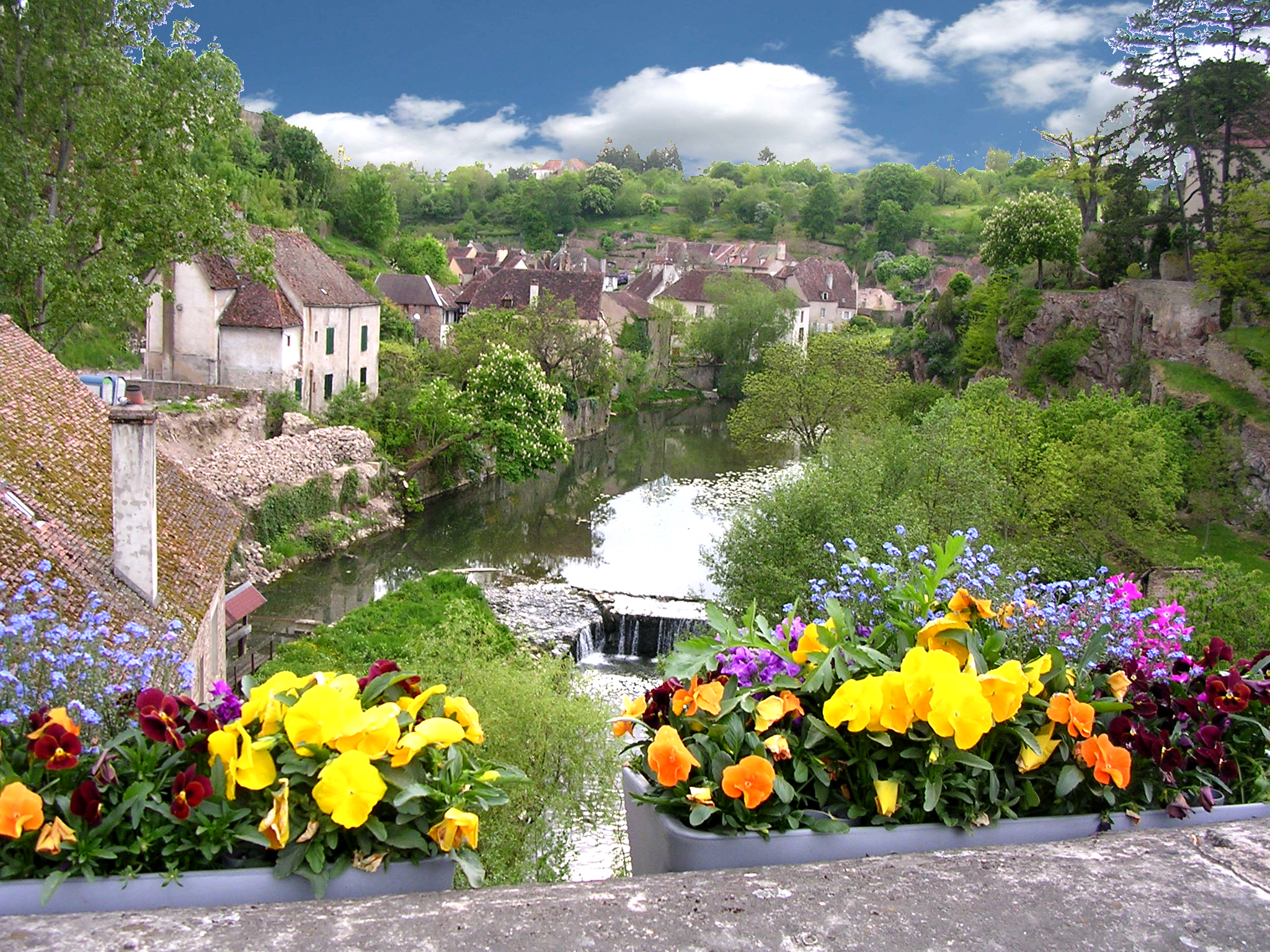 Semur-en-Auxois, Bourgogne, Côte-d'Or, l'Armançon depuis le pont Joly